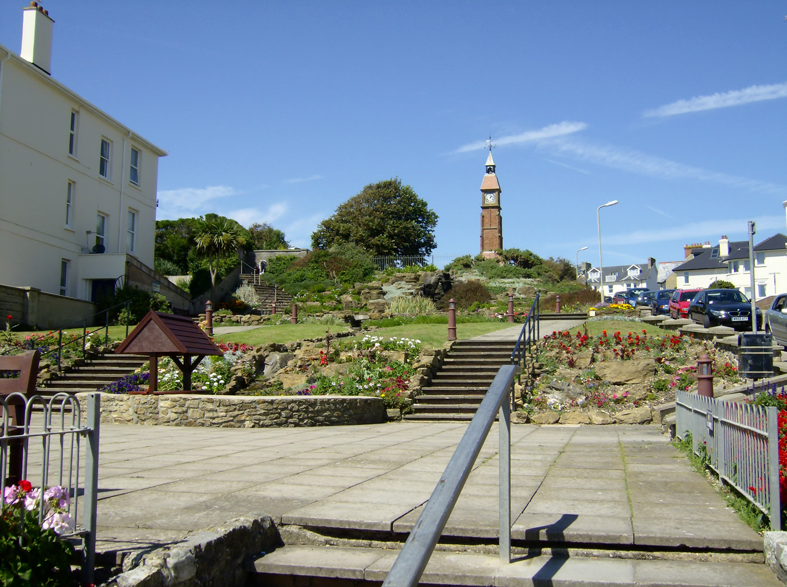 The Jubilee Gardens in Seaton, Devon.